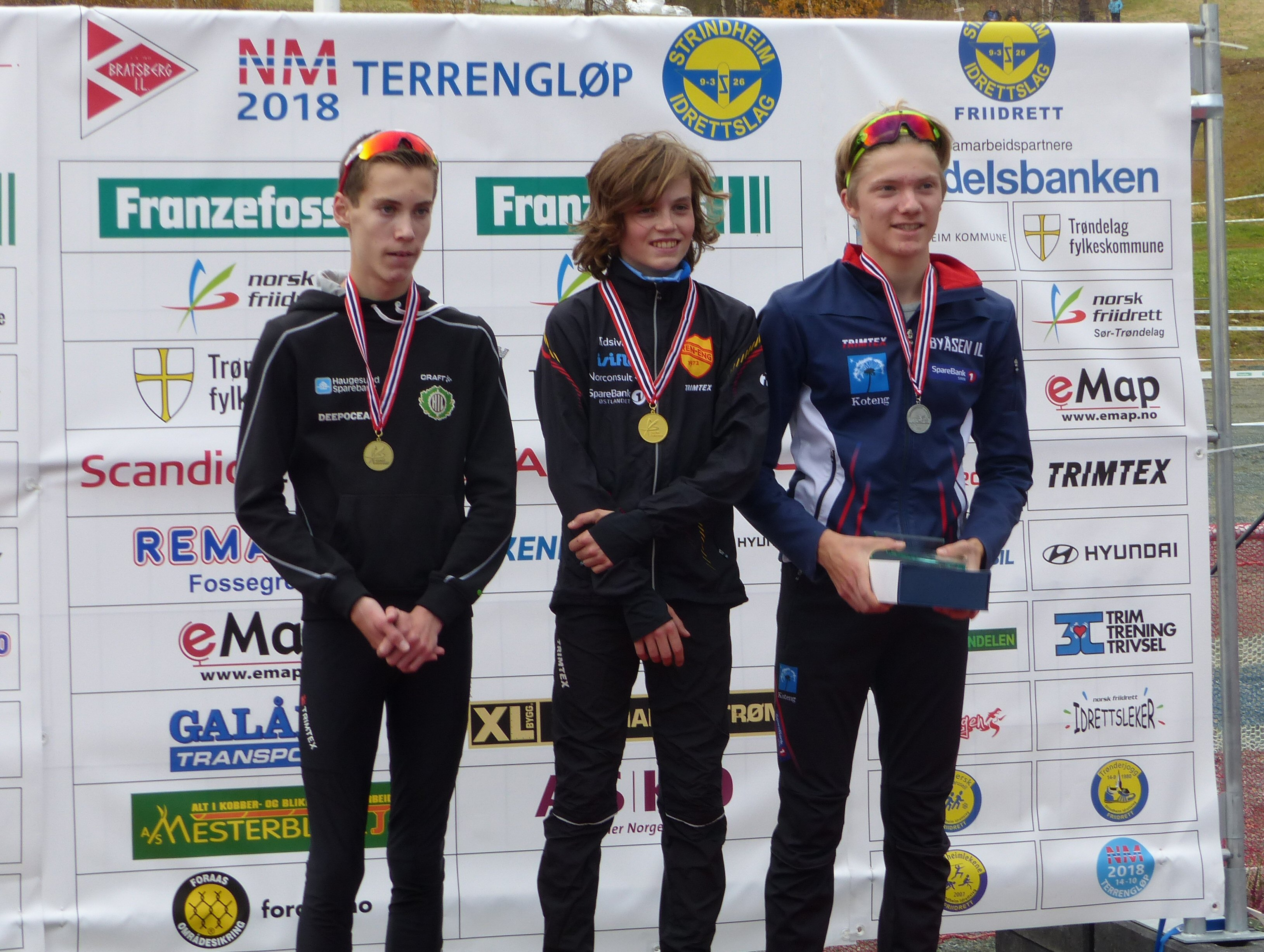 NM i terrengløp, lang løype, Bratsberg - Trondheim, 2018. Seierspallen for klassen G15.